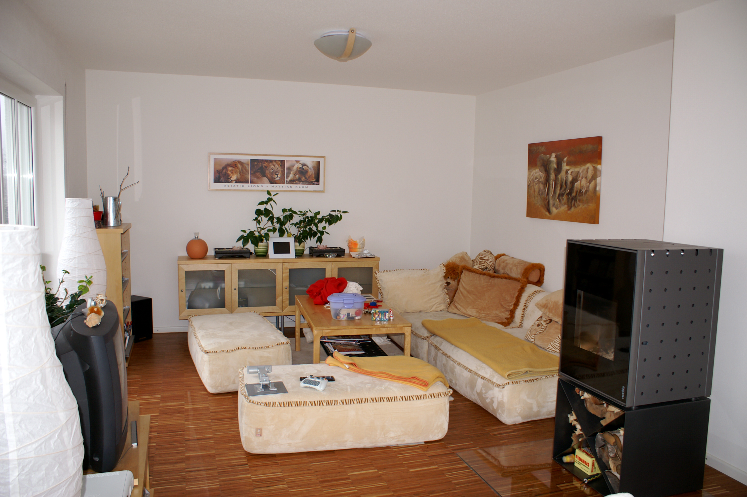 Die Kuschelecke